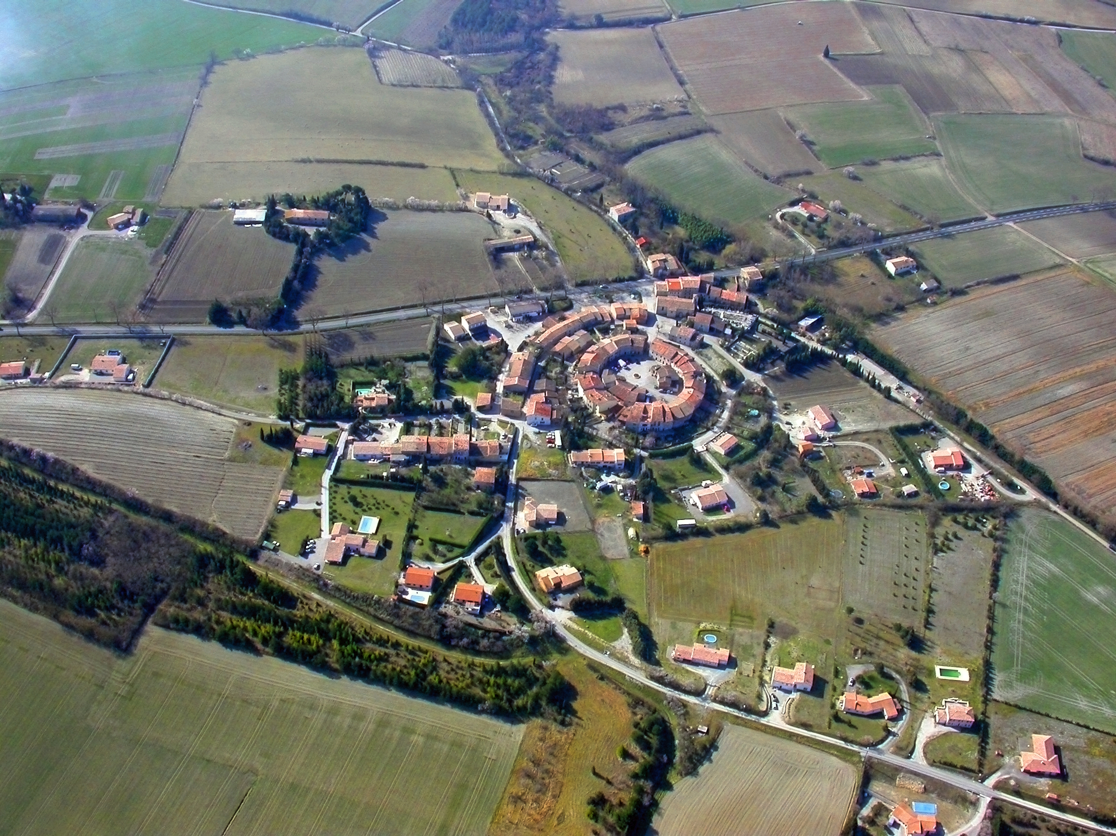 Vue aérienne de La Force (11270)